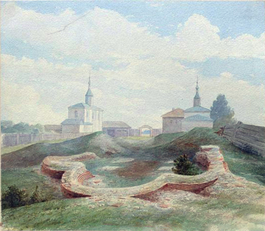 Беларуская (тарашкевіца): Полацак (Połacak), Бельчыца (Bielčyca). Манастыр Сьвятых Барыса і Глеба